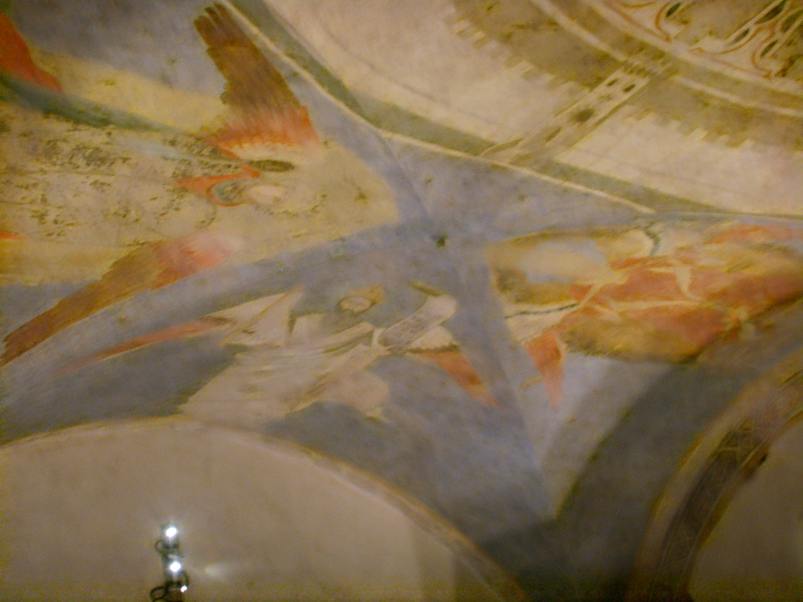 Palazzo_dell'Arte_dei_giudici_e_notai frescos in Florence, italy